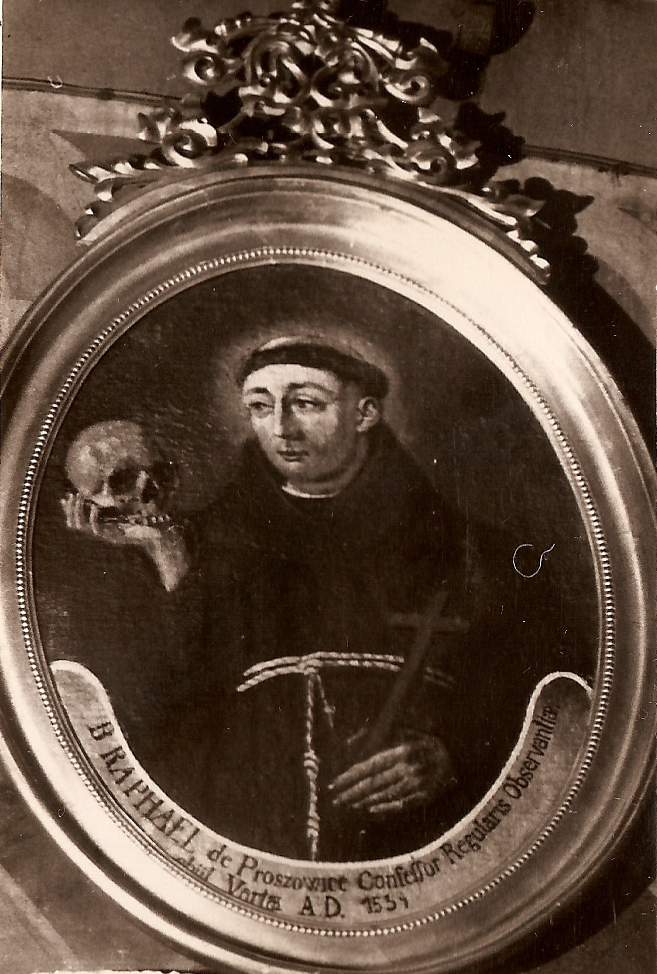 Obraz z XVII wieku z kościoła parafialnego w Proszowicach. Pierwotnie obraz znajdował się w ołtarzu Różańca Św. (wg opisu wyposażenia kościoła z 2 poł. XVIII w.). Obecnie wisi luźno na jednej ze ścian wewnątrz kościoła.